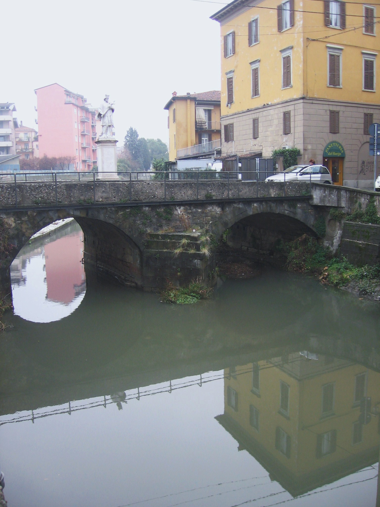 torrente Morla, Borgo Palazzo, Bergamo, Italy. La statua sul ponte rappresenta San Giovanni Nepomuceno